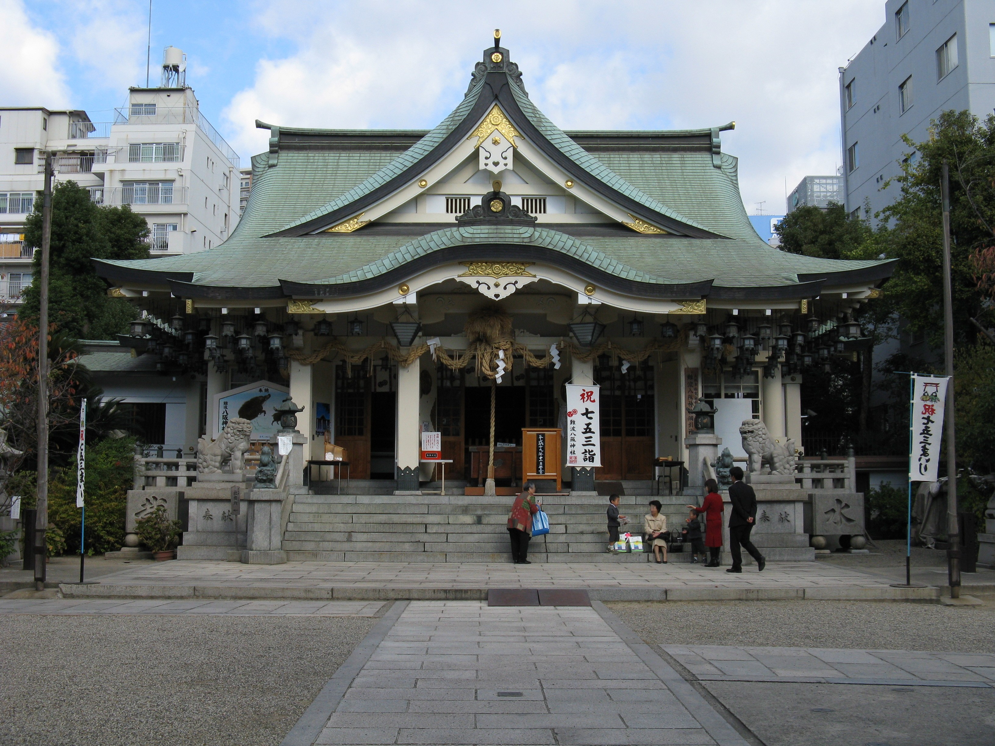 難波八阪神社 拝殿